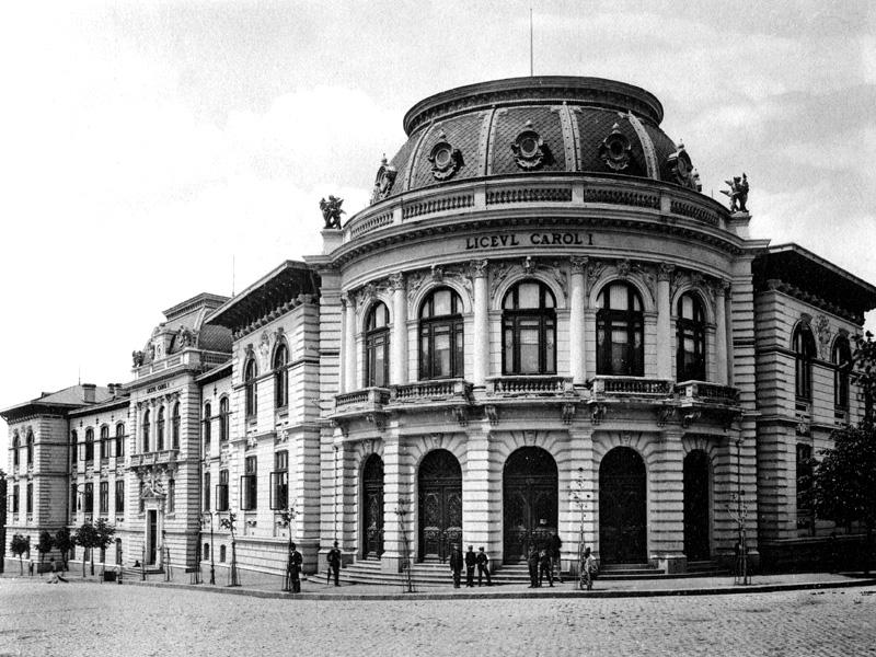 Cladirea Colegiului National Carol I care din 1948 s-a numit Liceul Nicolae Balcescu iar dupa 1990 a revenit la vechiul nume. A fost construita intre anii 1895-1896 dupa planurile arhitectului Toma Dobrescu.